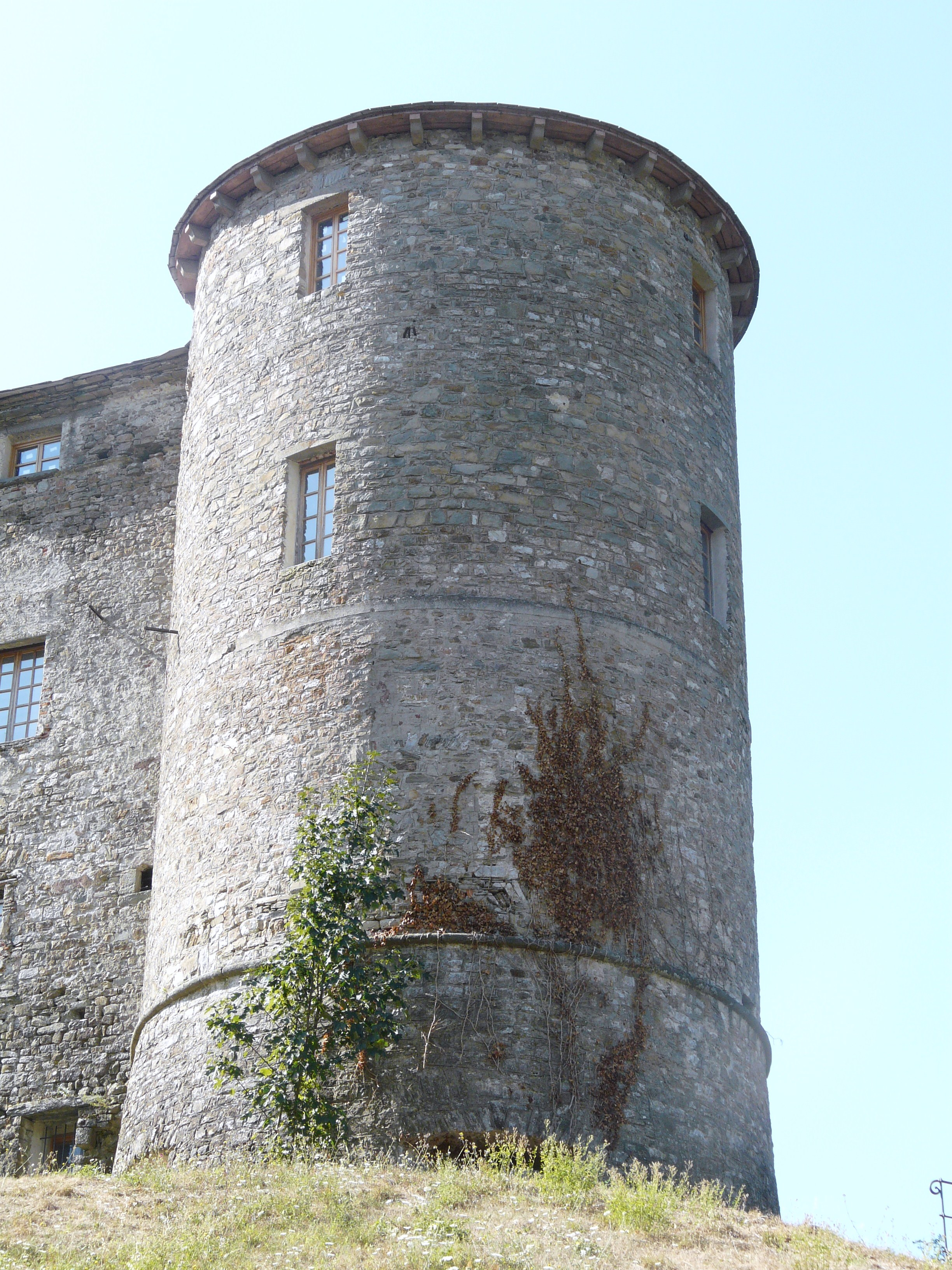 Castello Doria Malaspina, Calice al Cornoviglio, Liguria, Italia